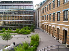 IAE Lyon, Librairie